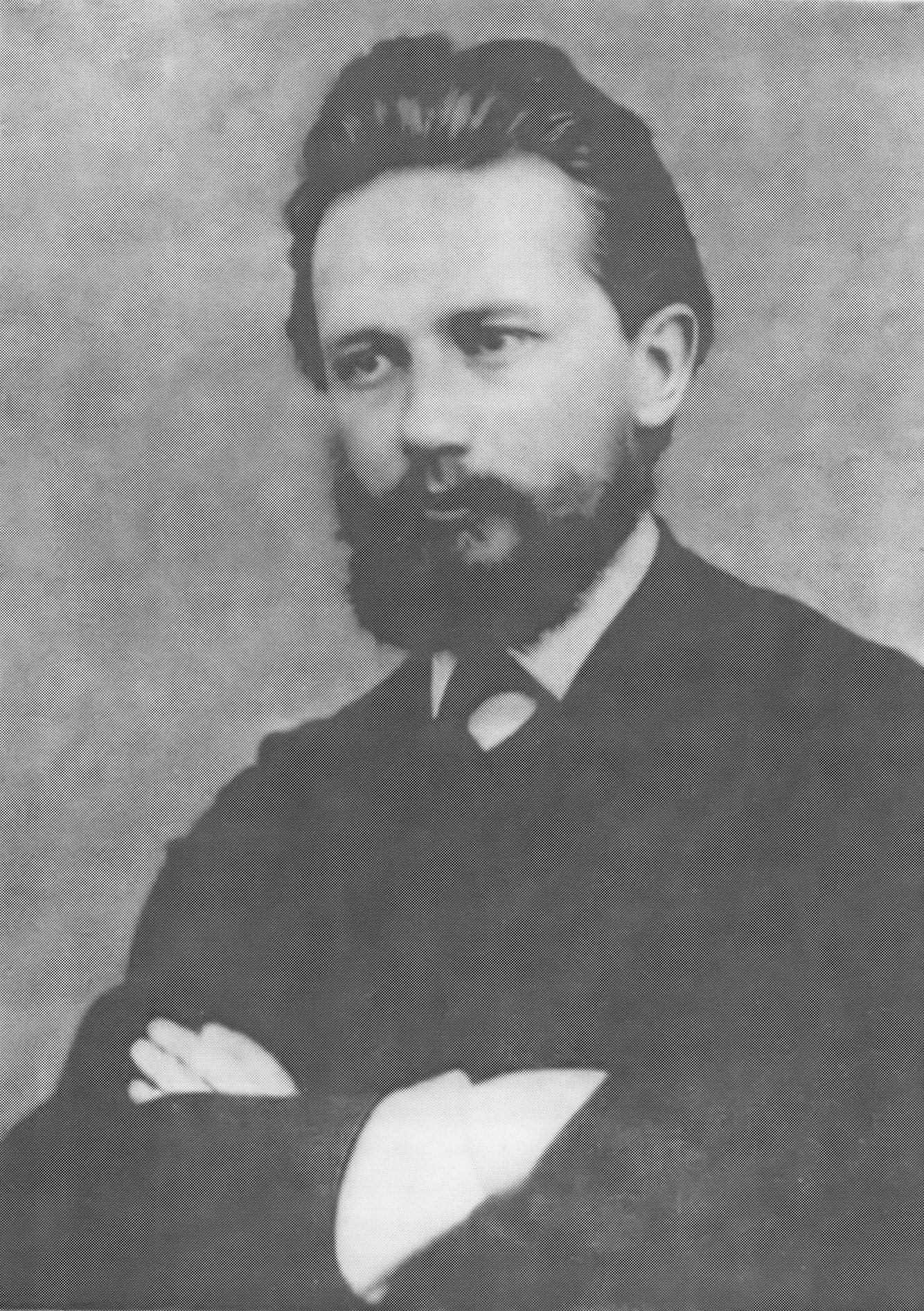 Photographie de Piotr Tchaïkovski en 1868